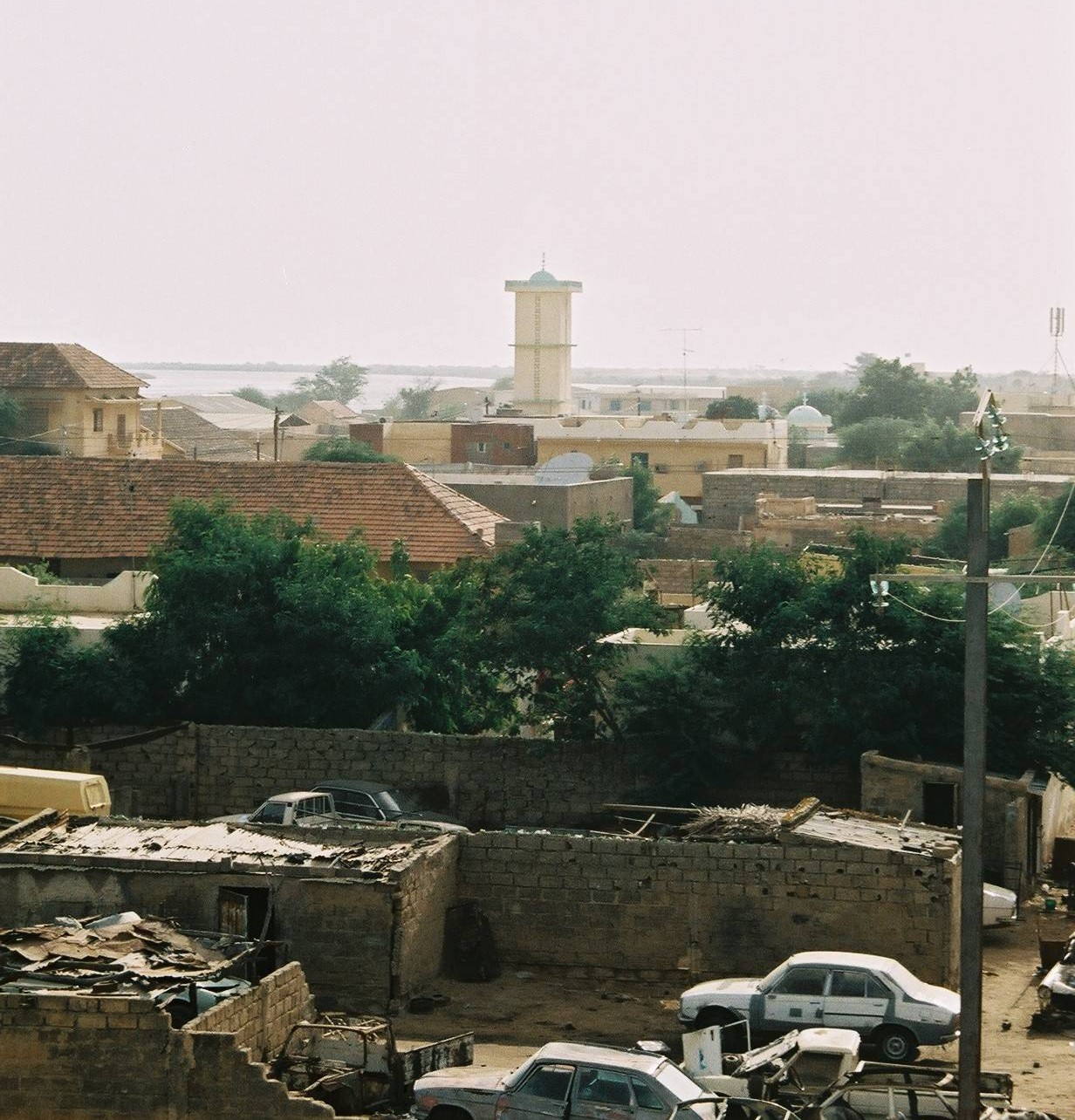 Vue sur la mosquee de Rosso (Mauritanie)